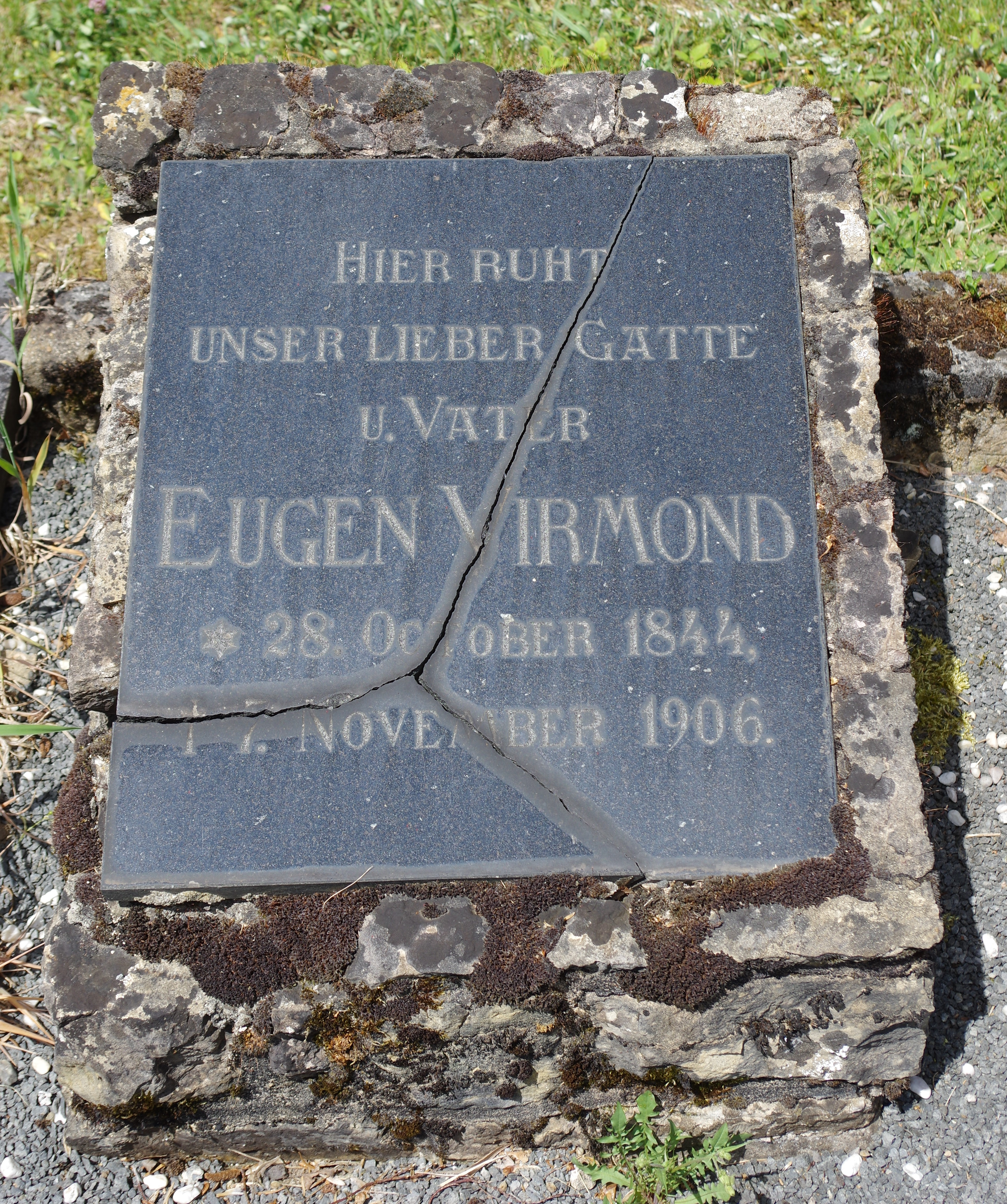 Hellenthal, Friedhof, Grabstein Eugen Virmond (2017)